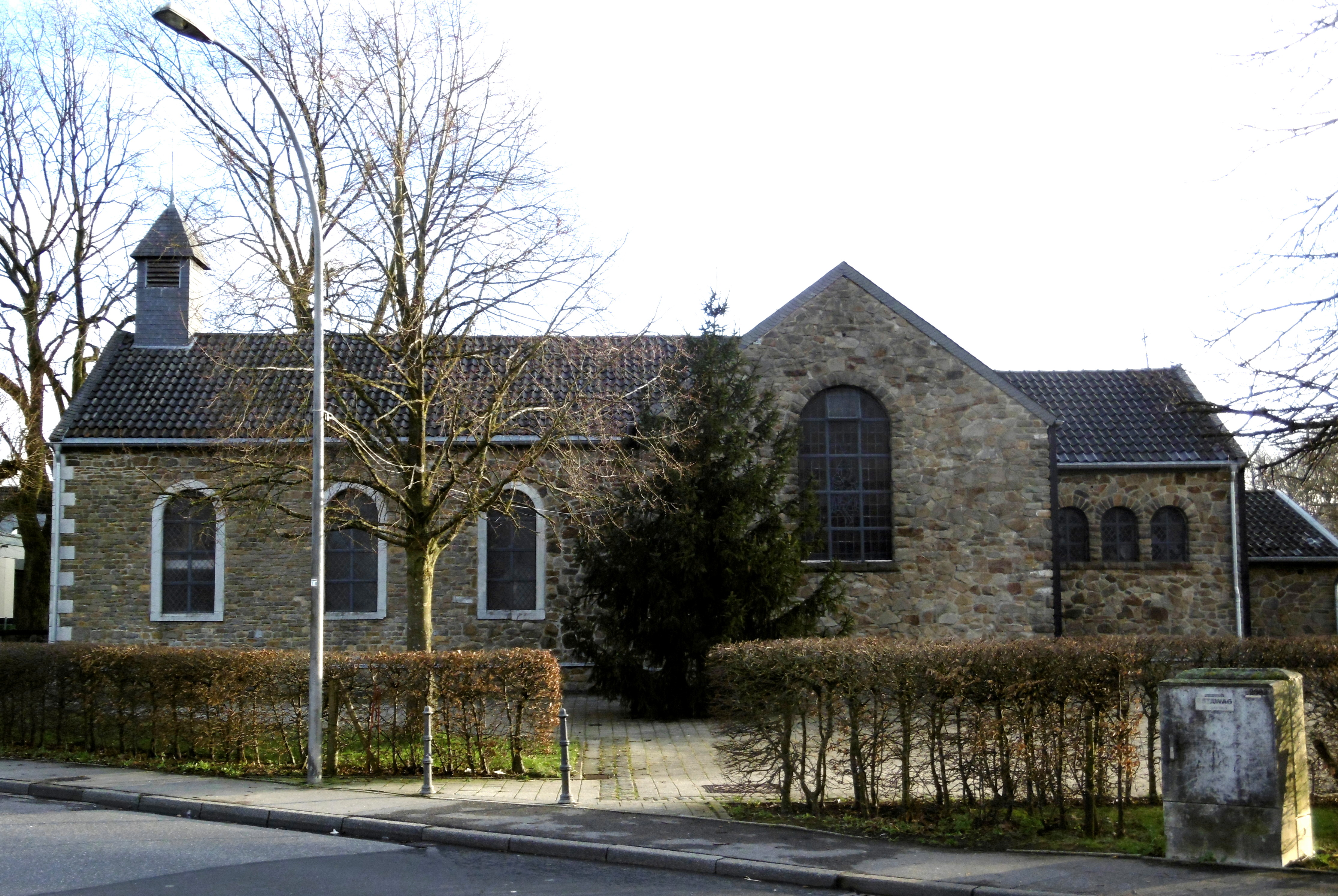 Dreifaltigkeitskapelle Aachen-Schlekcheim, Nordseite